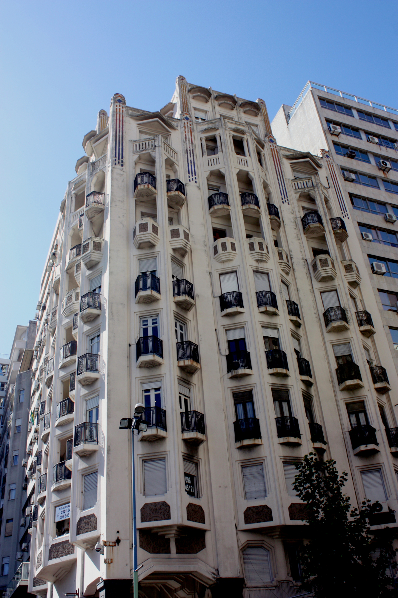 Palacio Rinaldi. Ubicado en la esquina noreste de Avda. 18 de Julio y Pza. Independencia. Montevideo.